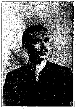 griechischer Politiker, 20. Jahrhundert